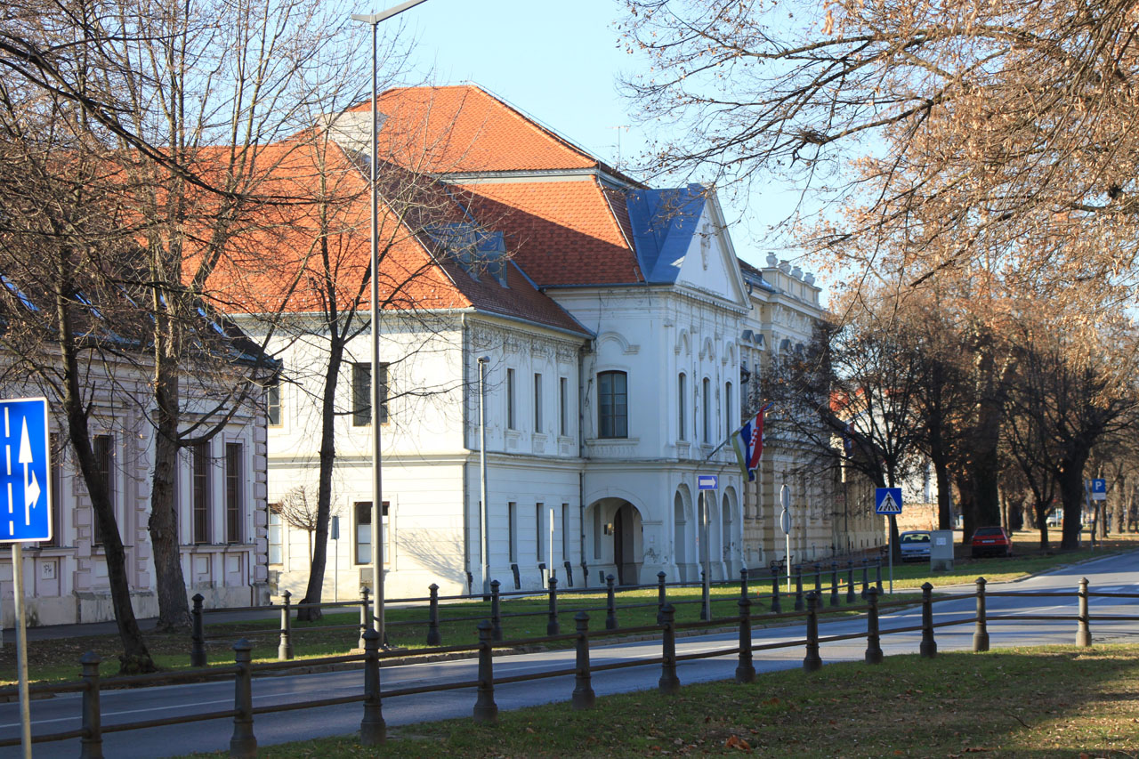 Kompleks vlastelinstva Eltz, Županijska 1, 2, 3, 4, 5 i 7, Gradski muzej Vukovar